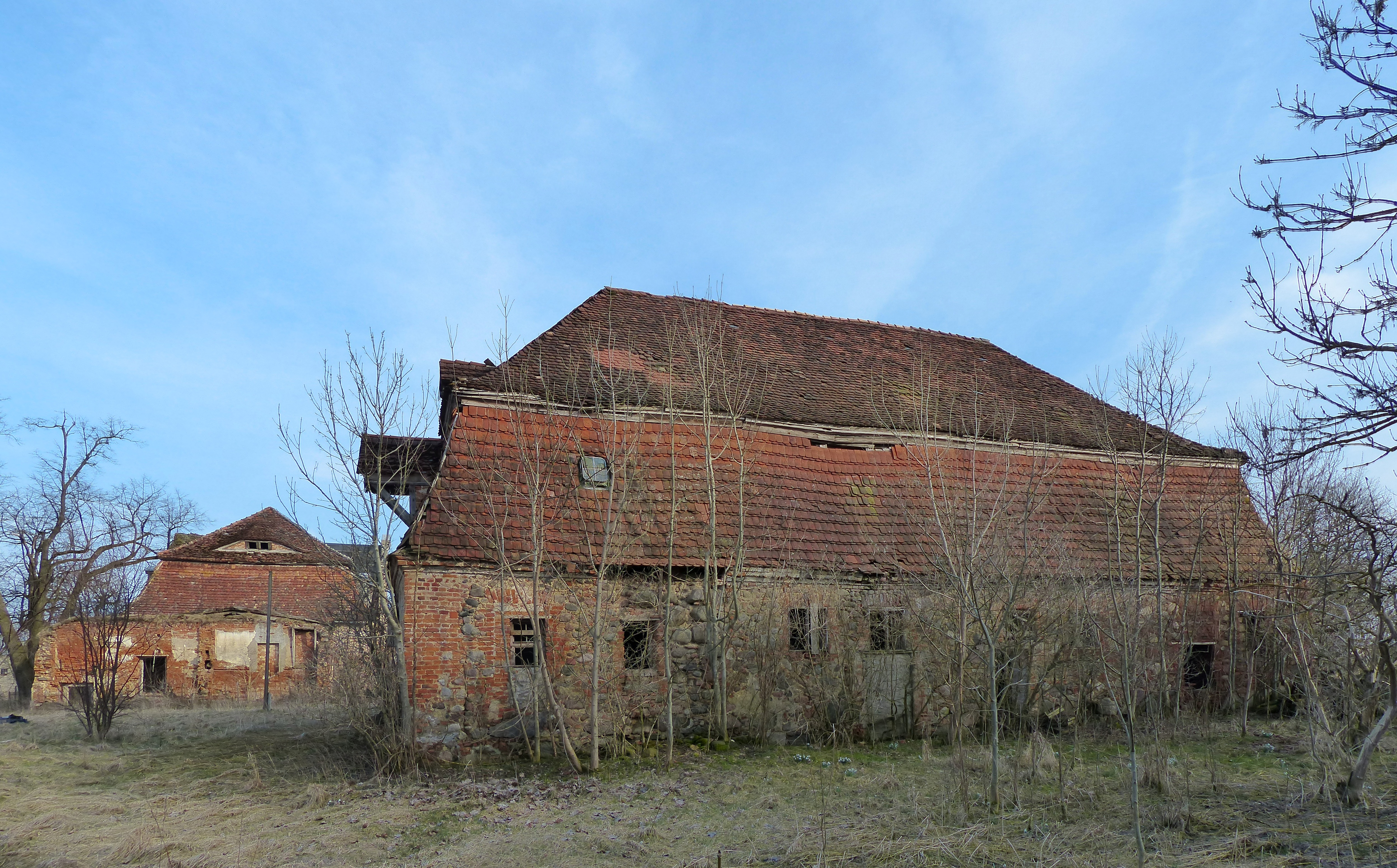 Gutshaus Dargibell (links), Wirtschaftsgebäude, Ansicht von Nordwesten